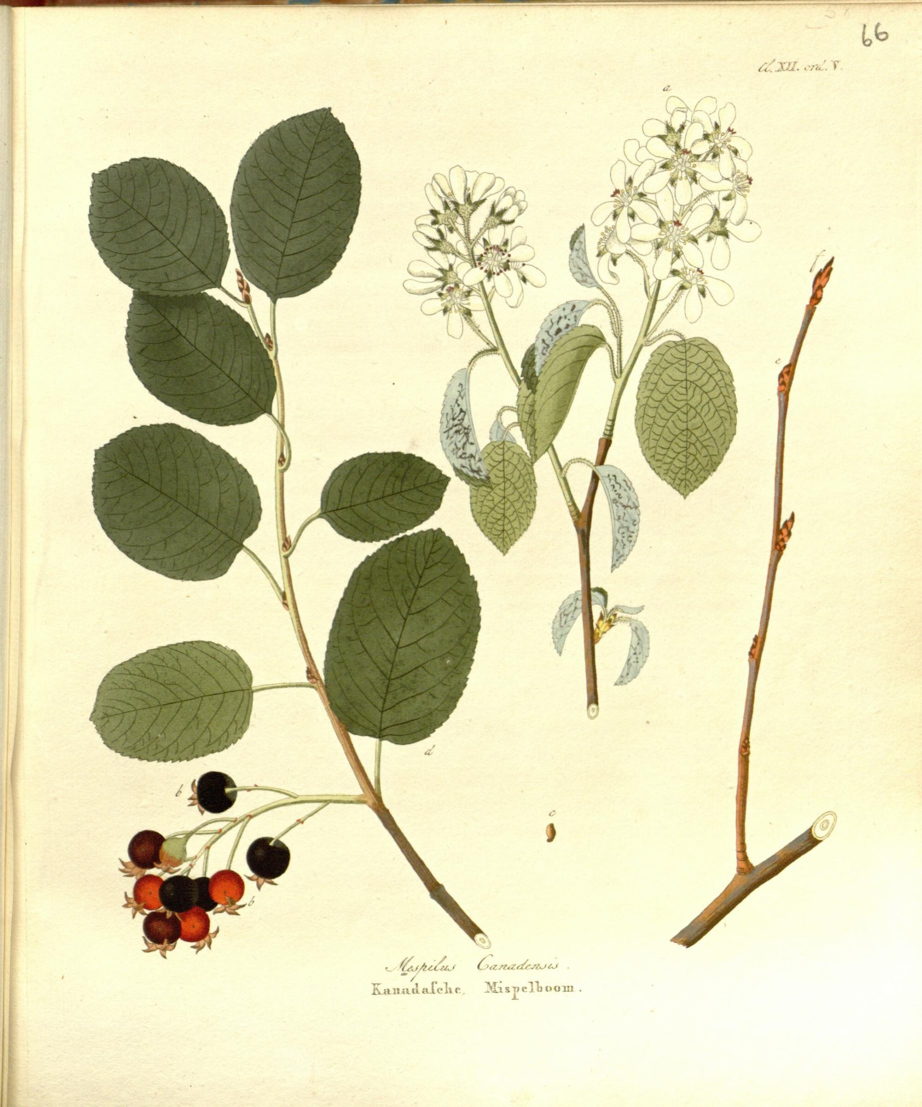 • I ^^ r/.JJI- rro!. T a. I I ) .1 "..■ Kaiiailafcltc. XispelLooiu . I- 1 1 .. ■